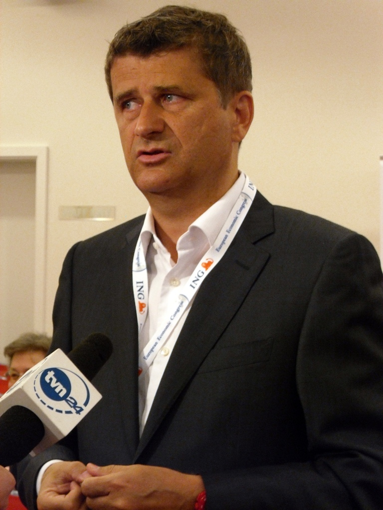 Janusz Palikot. Zdjęcie zrobione podczas trzeciego dnia III Europejskiego Kongresu Gospodarczego w Katowicach